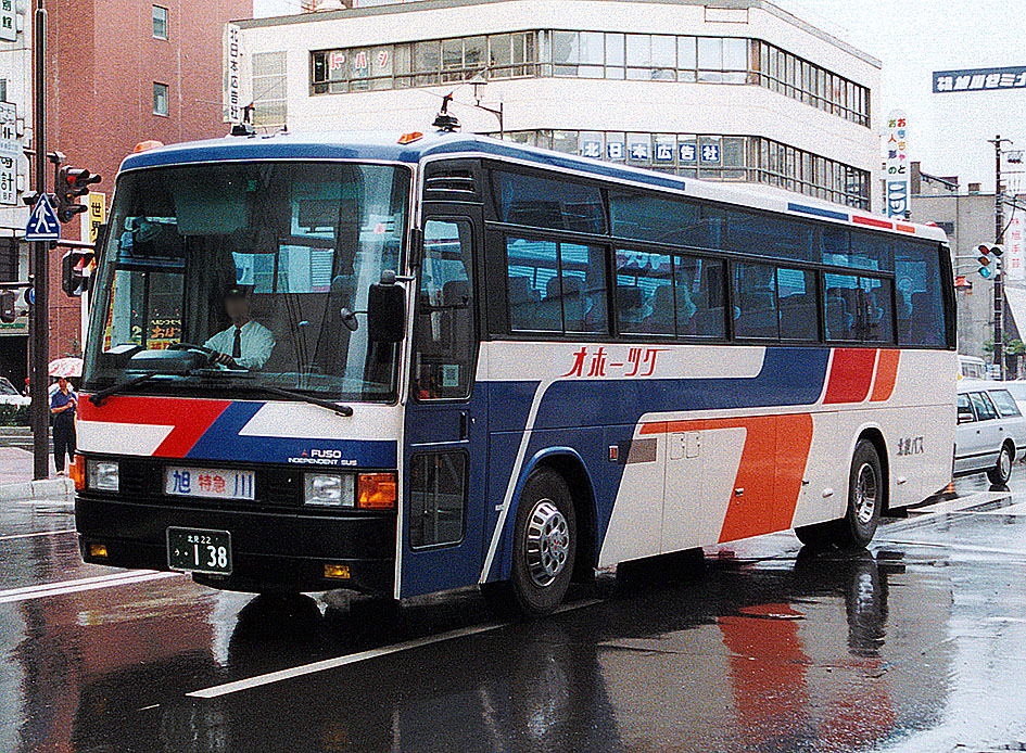 北紋バス 特急オホーツク